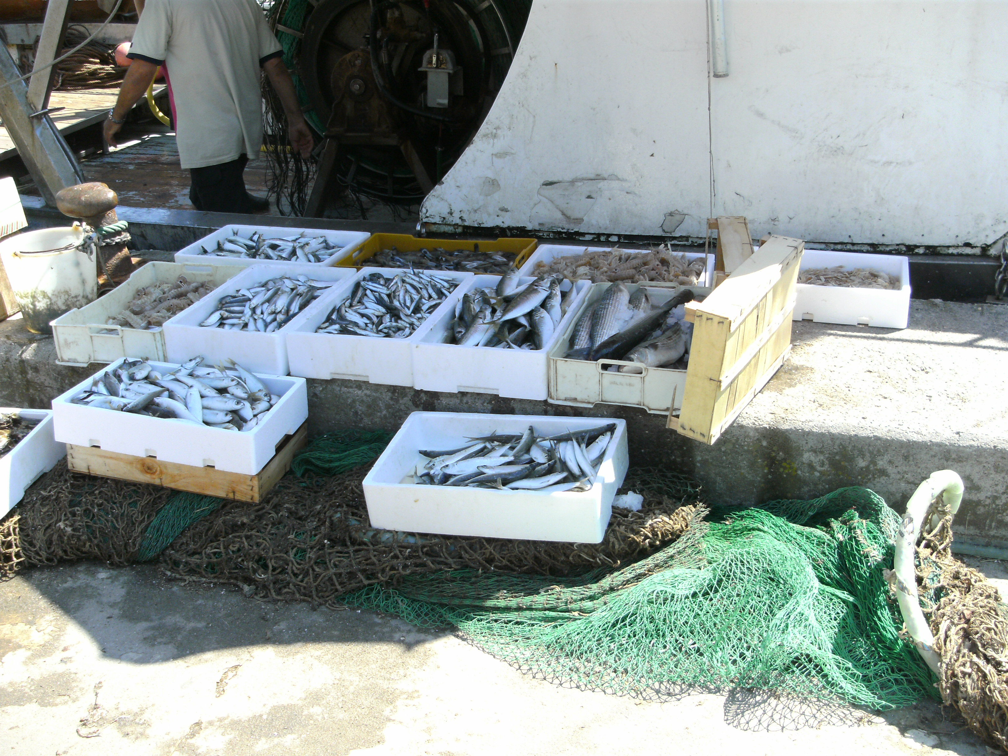 Porto Garibaldi (Comacchio, FE), Verkauf von Fisch direkt vom Fischerboot am Hafen von Porto Garibaldi